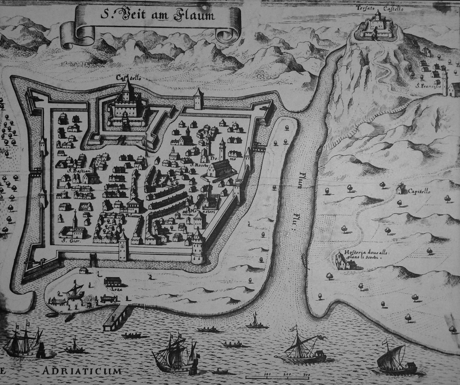 St. Veit am Flaum, German name for Rijeka; Trsat Castle, Rijeka, Croatia